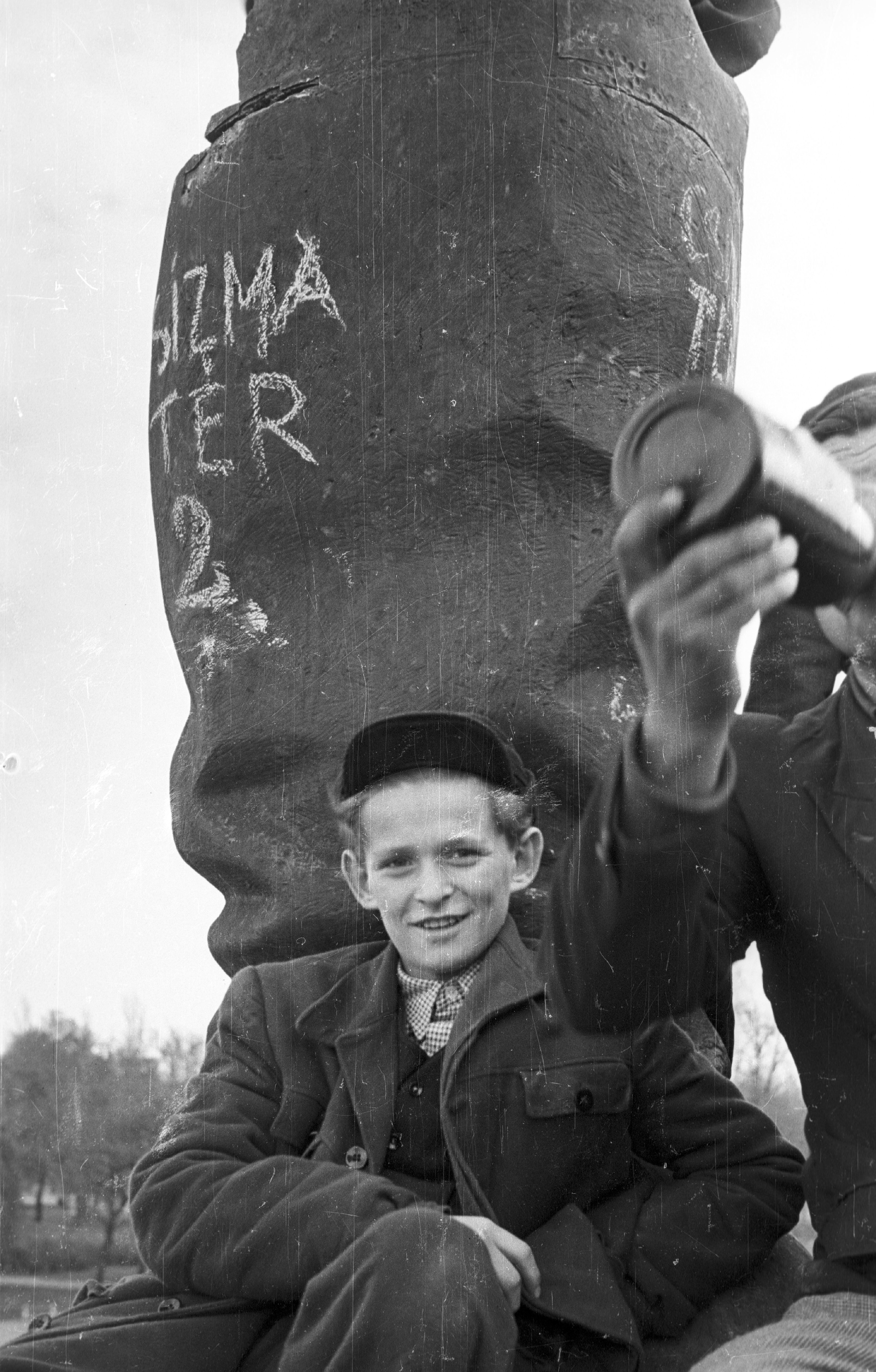 Ötvenhatosok tere (Sztálin tér), a Sztálin szobor maradványa. Location: Hungary, Budapest XIV. Tags: Csizma square, Budapest Title: Ötvenhatosok tere (Sztálin tér), a Sztálin szobor maradványa.